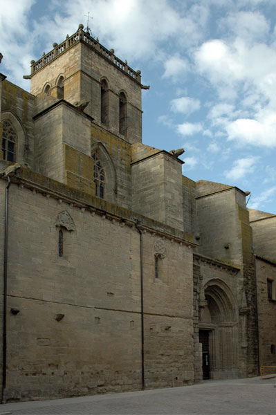 Santa Coloma de Queralt (Conca de Barberà). Església de Santa Coloma